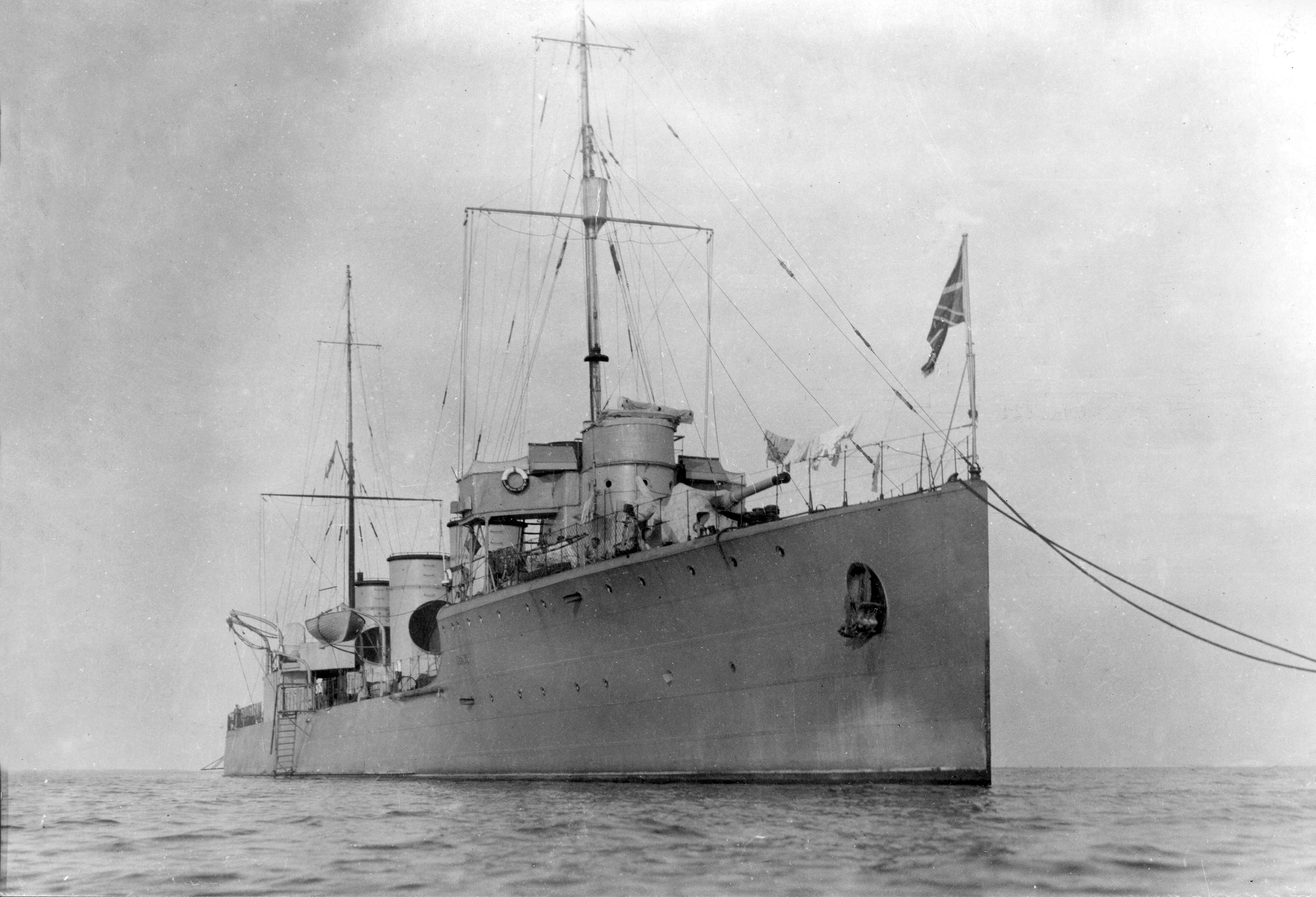 Imperial Russian destroyer Novik.